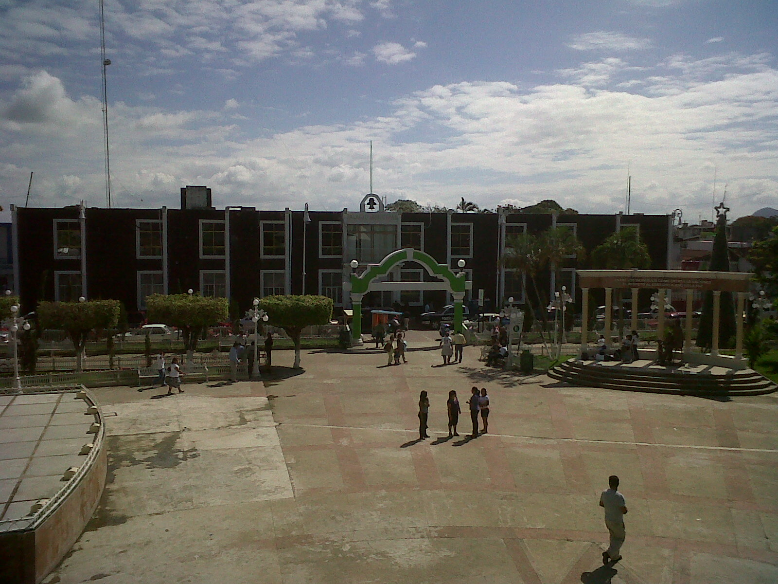 Palacio Municipal de Macuspana, estado de Tabasco, México.